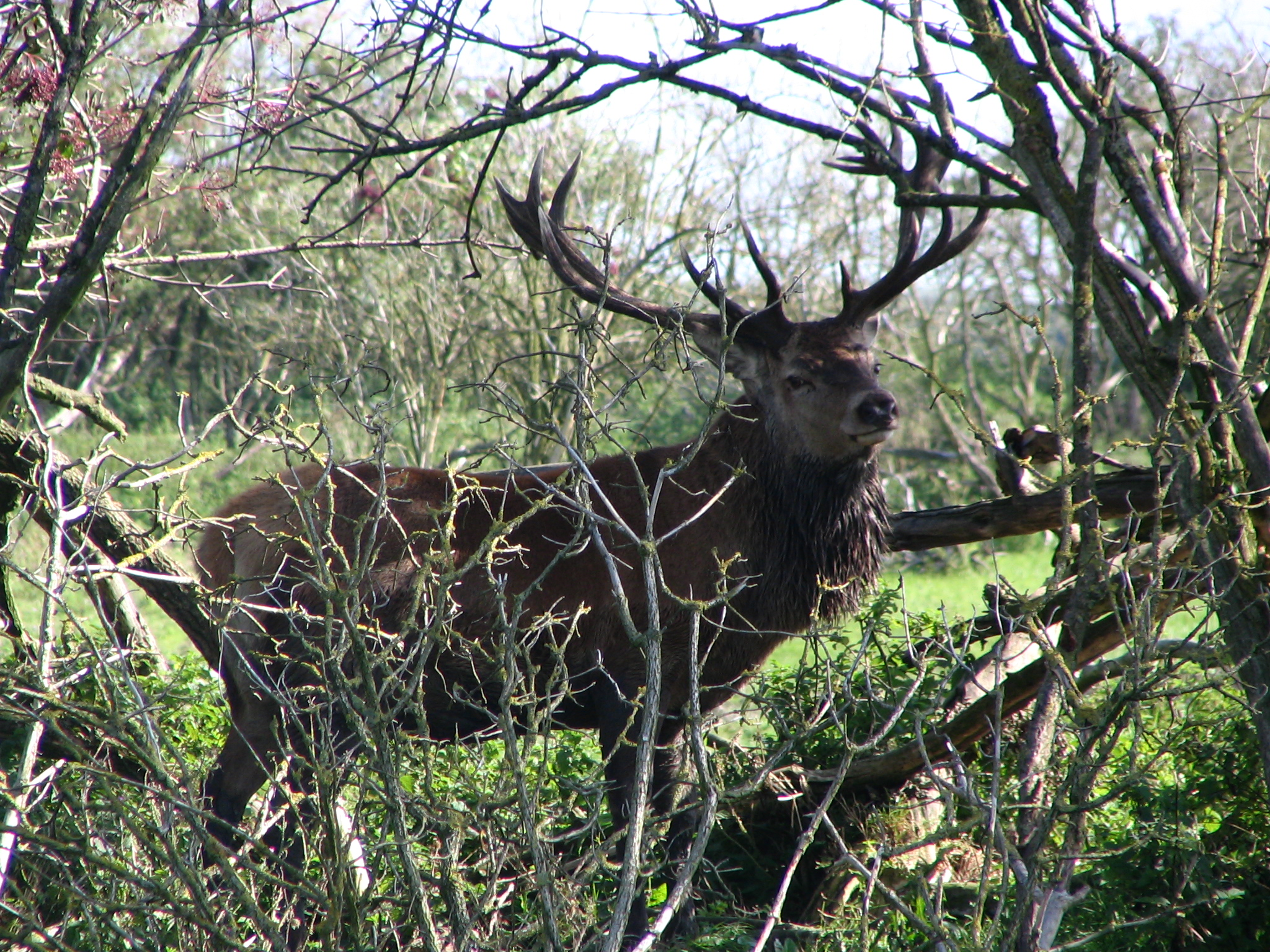 eigen foto. Oostvaardersplassen 16-9-2004. GerardM 16 sep 2004 22:14 (CEST)